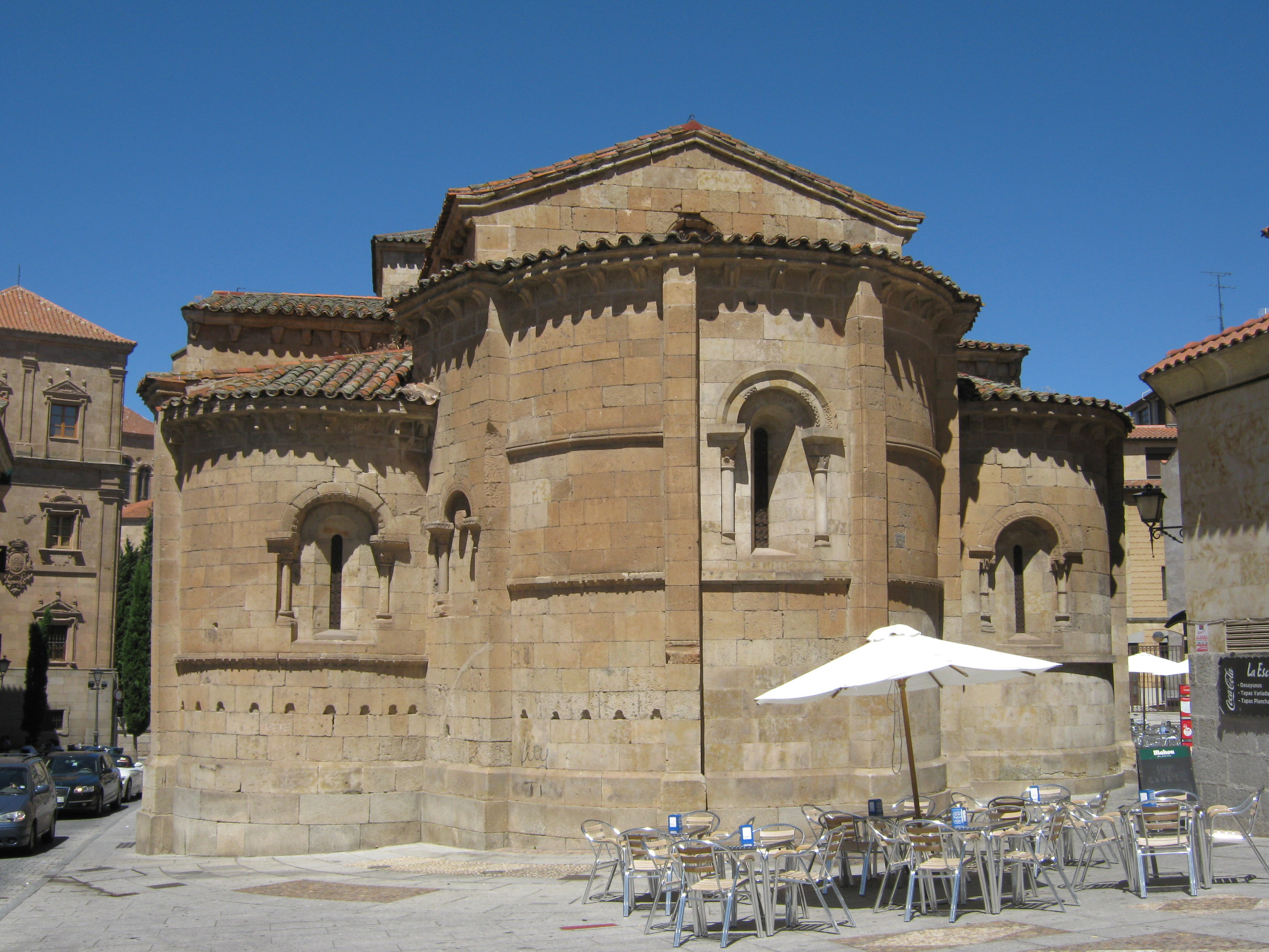 Ábsides románicos de la iglesia de Santo Tomás Cantuariense, en la ciudad de Salamanca (antiguo Reino de León)